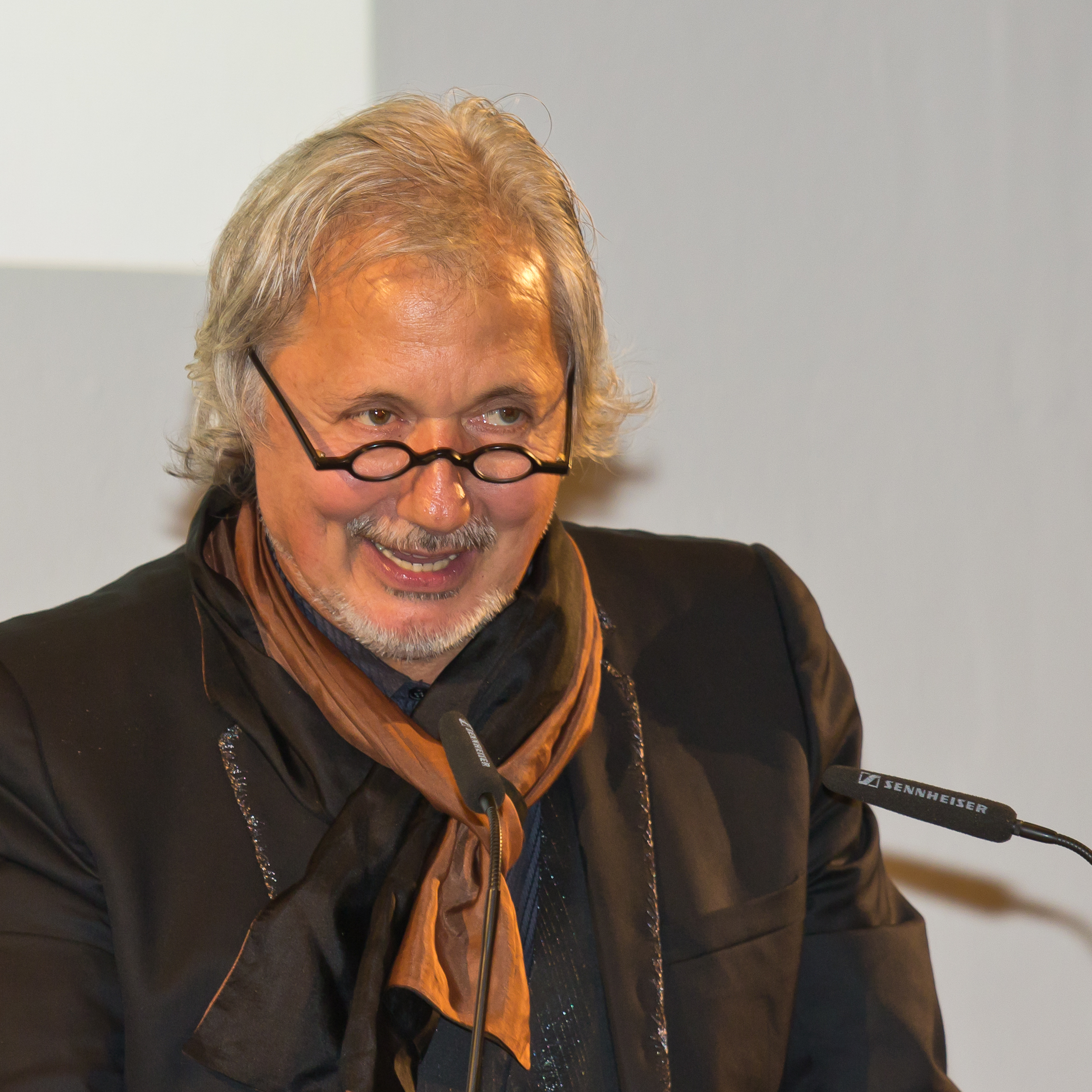 Verleihung des Rheinischen Kulturpreises der Sparkassen-Kulturstiftung Rheinland in der Piazetta des historischen Rathauses von Köln an Alexandra Kassen. Laudatio durch Konrad Beikircher